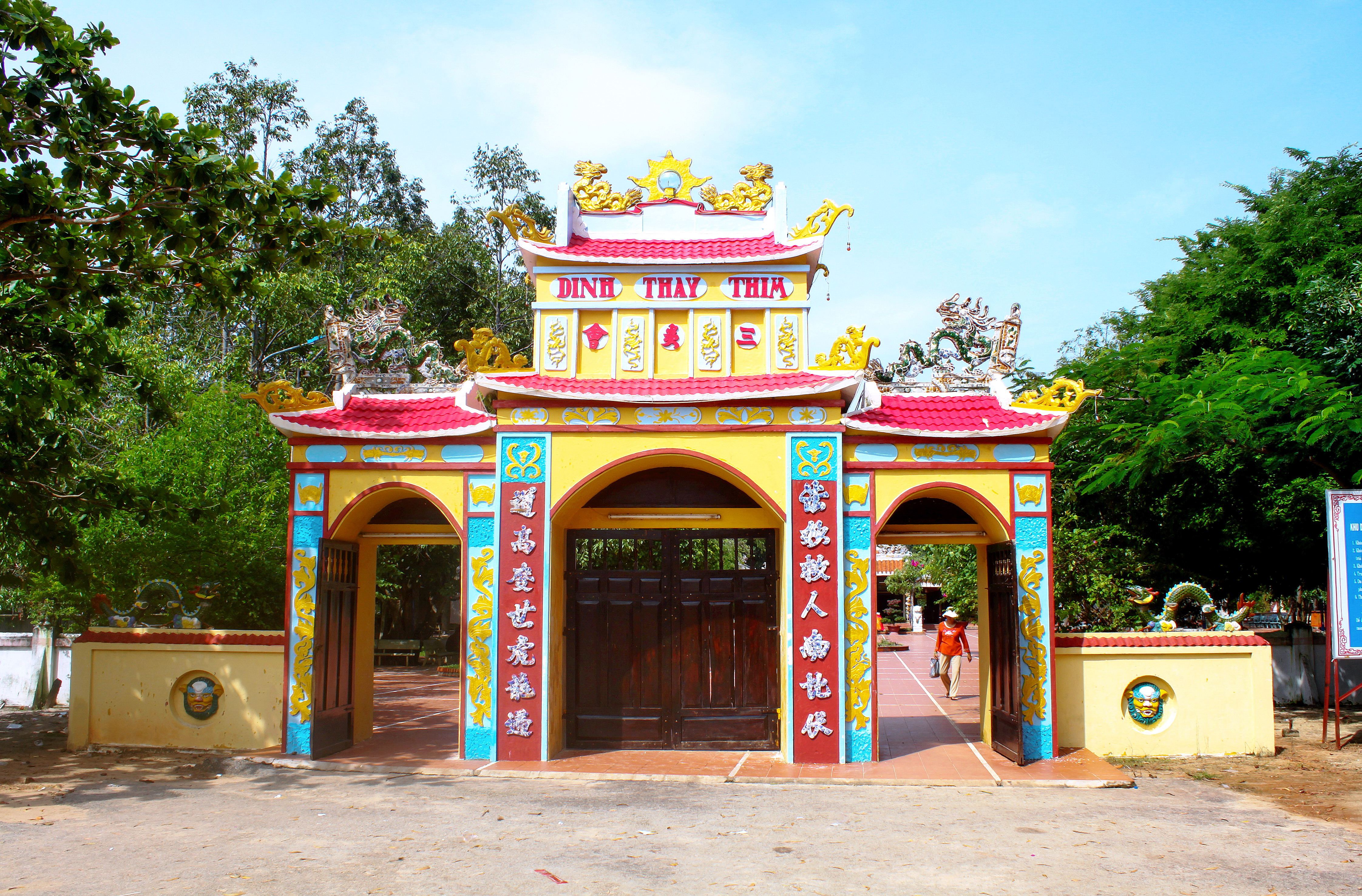 Tam quan Dinh Thầy Thím tọa lạc tại xã Tân Hải, thị xã La Gi, tỉnh Bình Thuận. Đây là một di tích kiến trúc – nghệ thuật cấp Quốc gia Việt Nam.